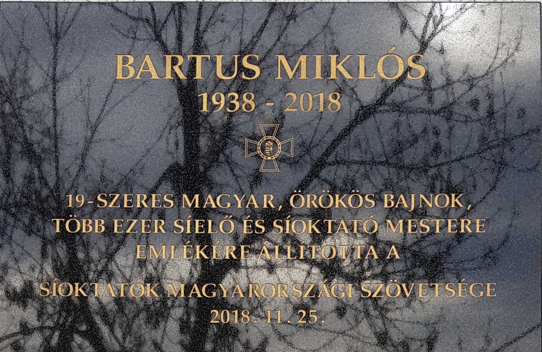 Bartus Miklós olimpikon síelő, síoktató emléktáblája a Normafa síház falán (Budapest XII., Eötvös u. 59)